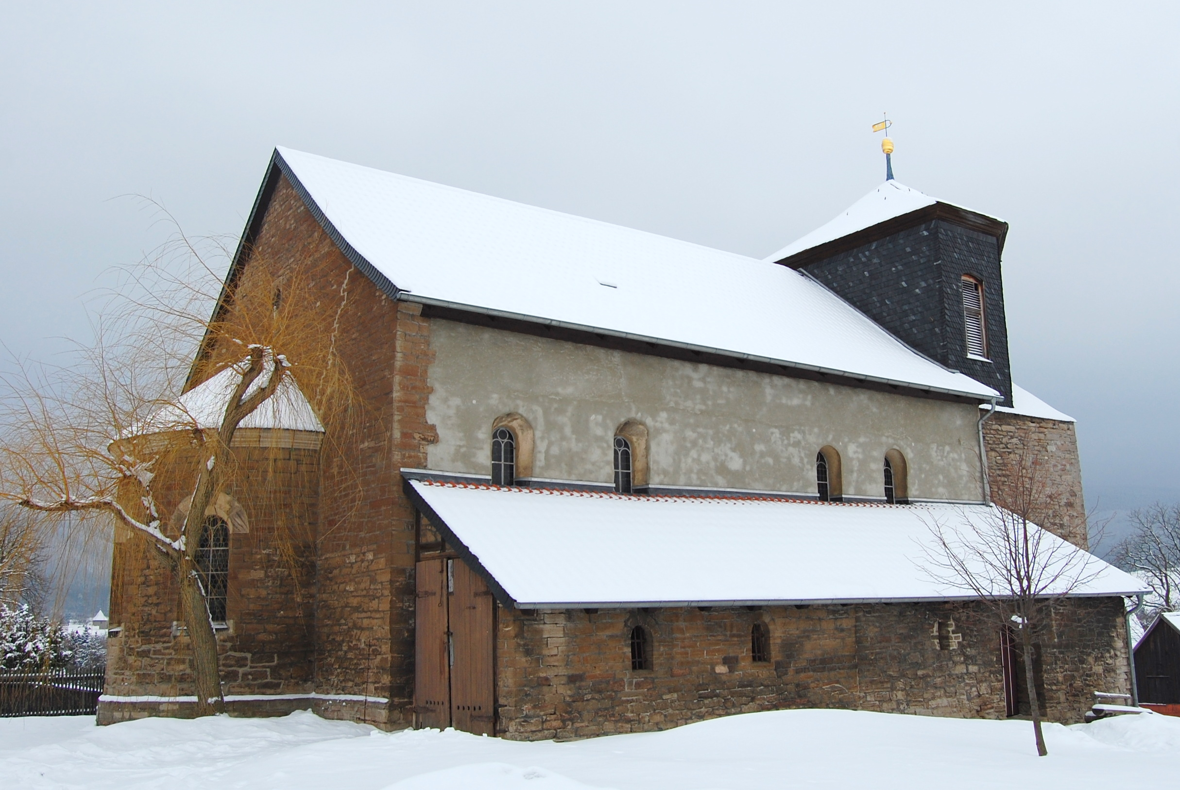 Sankt-Katharina-Kirche Altenrode